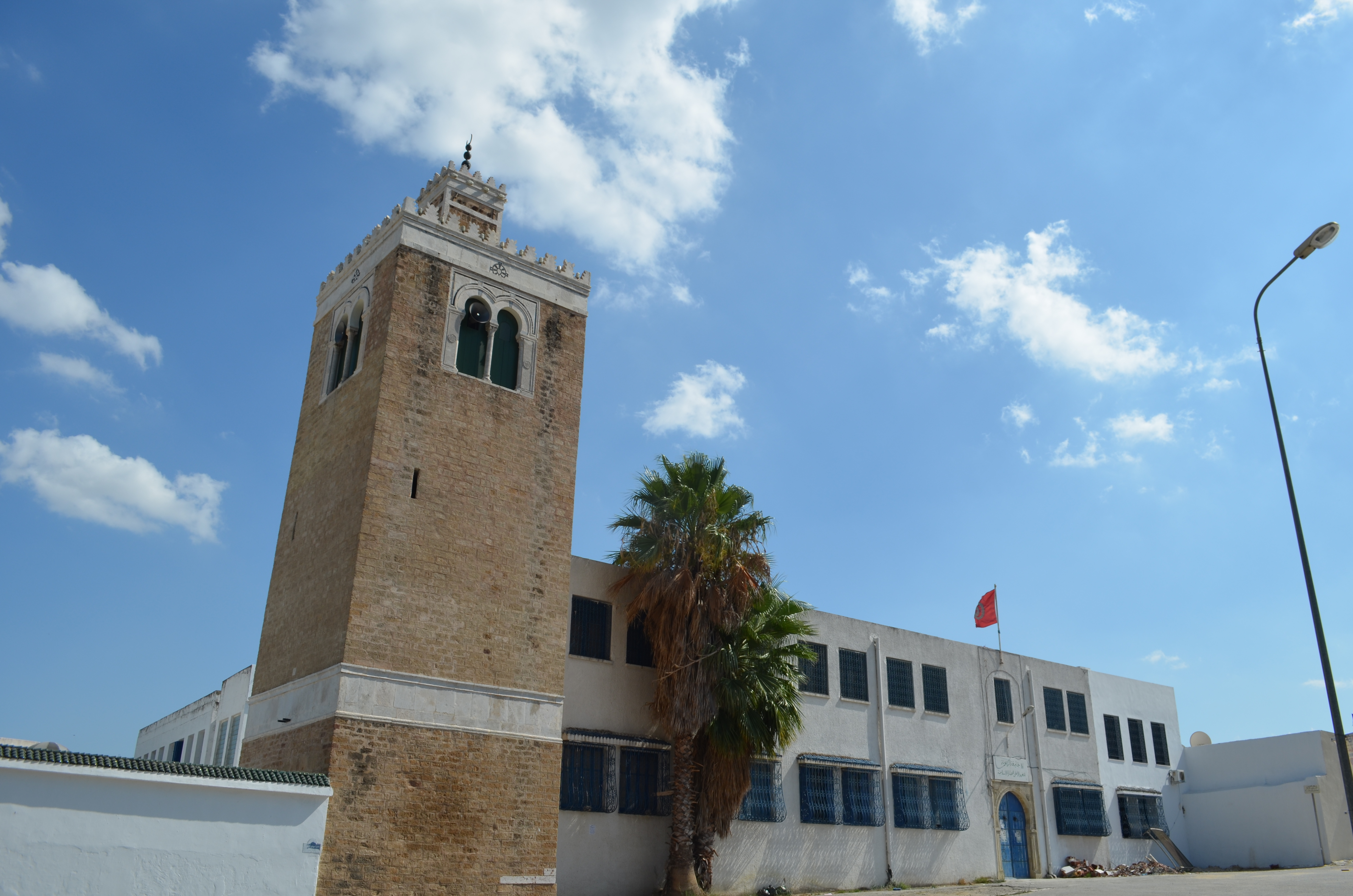 Mosquée d'El-Haoua, Tunis